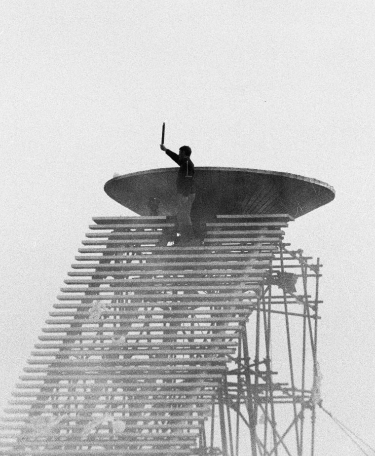 Opening Olympische winterspelen te Grenoble, Alain Calmat ontsteekt Olympische vlam